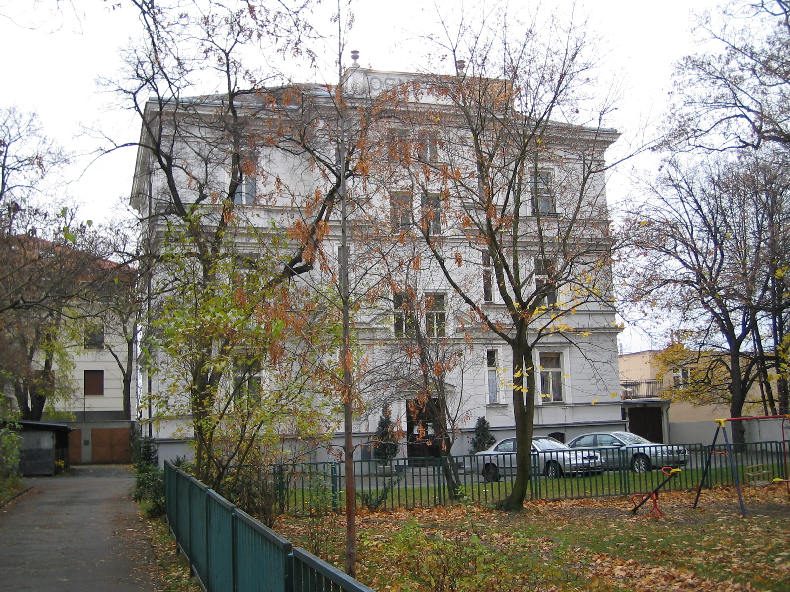 Vila Osvěta v ulici Jana Masaryka, Praha 2 - Vinohrady.